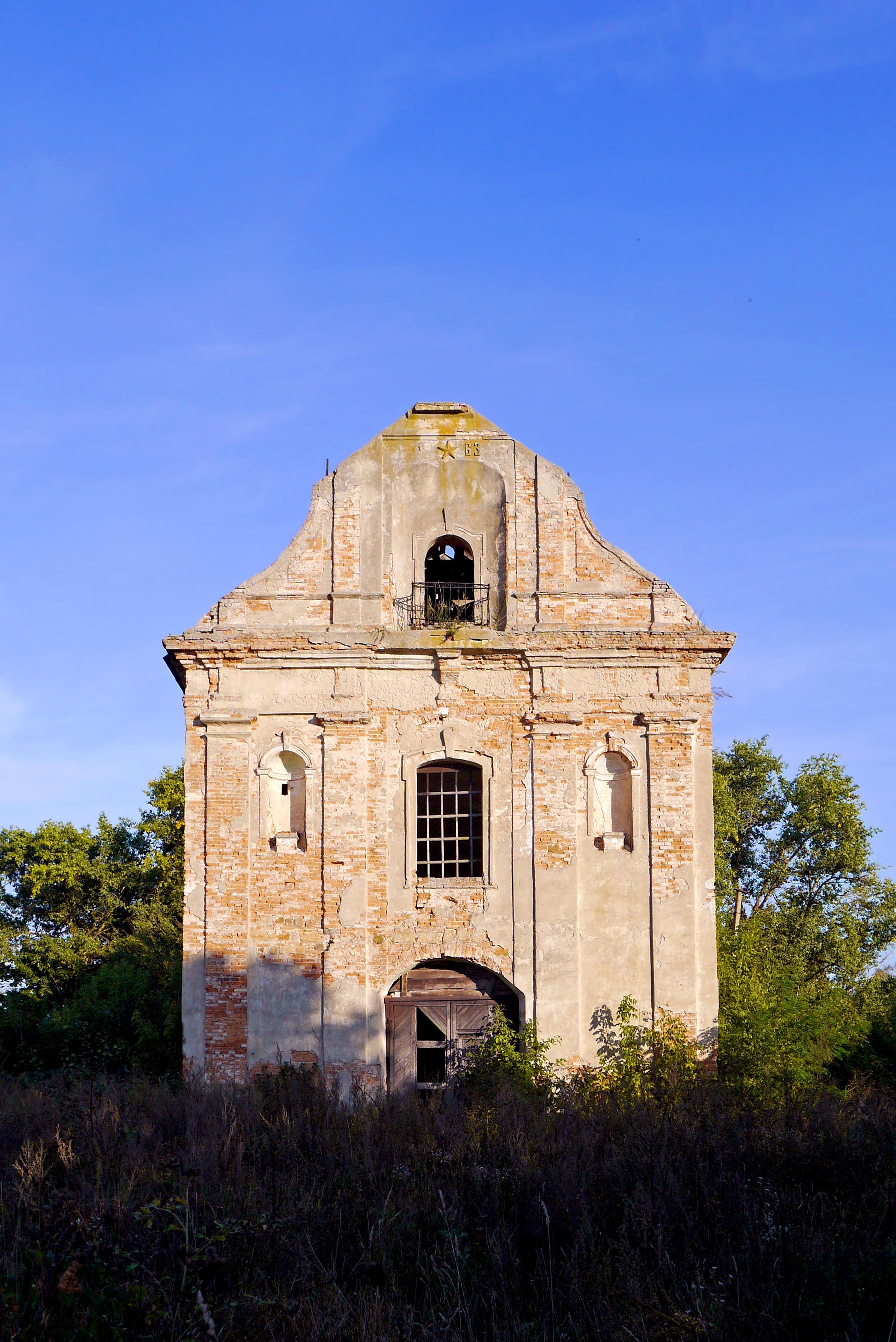 Костьол Пресвятої Трійці з огорожею, Пиків, вул. Леніна